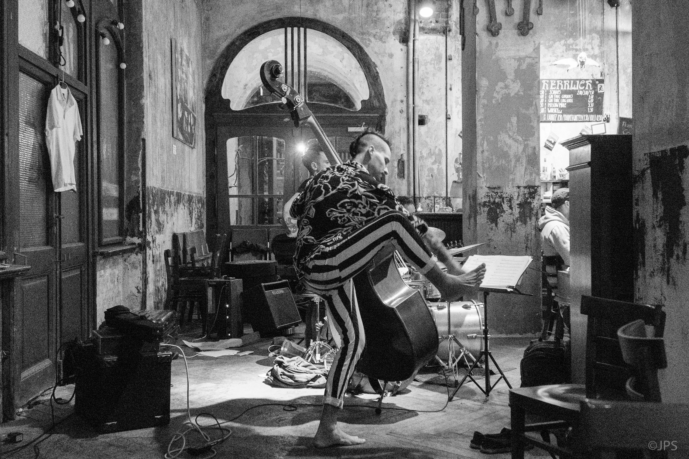 Robert Lucaciu live in Leipzig 2019